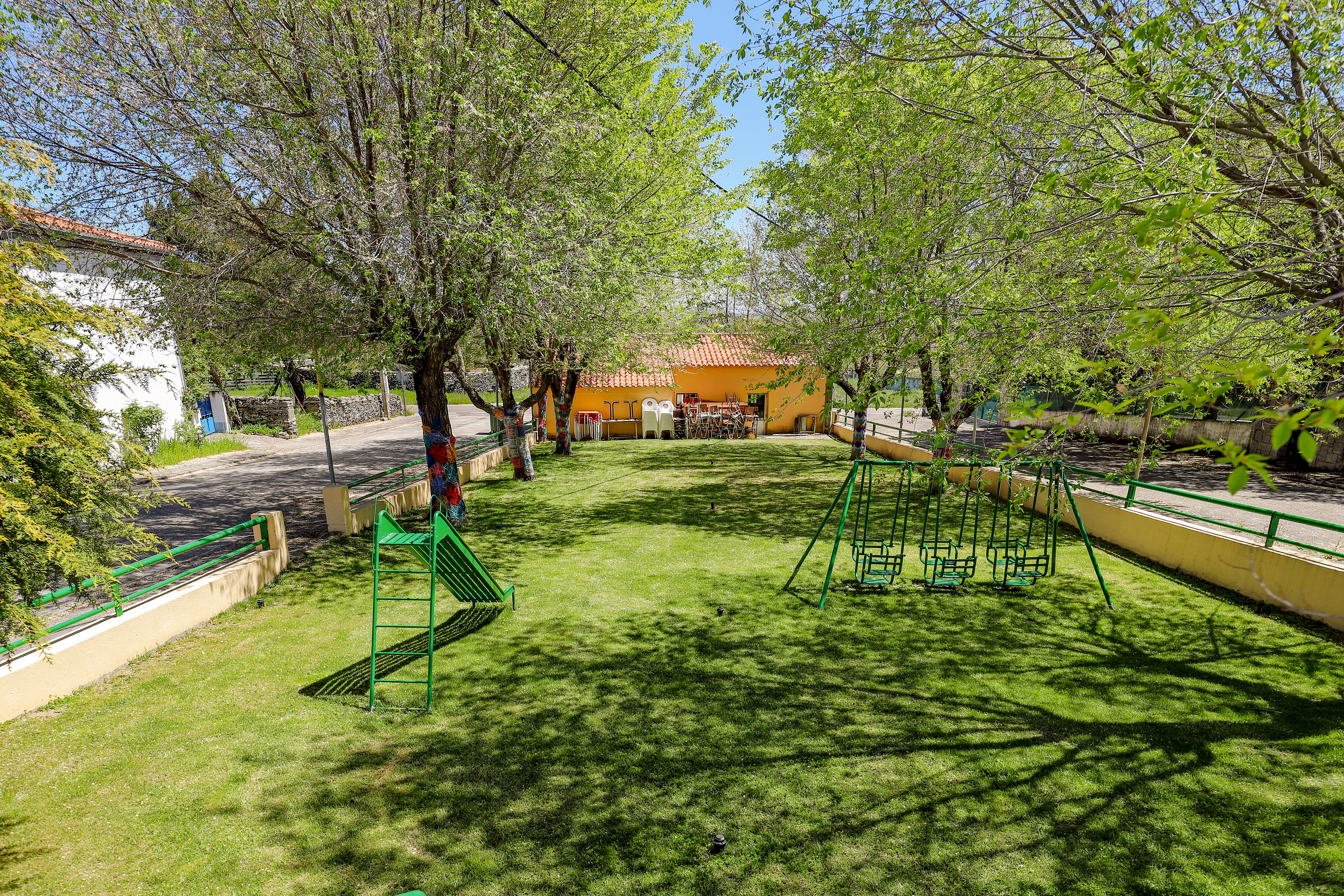 Herguijuela del Campo es un municipio de la comarca Entresierras, en la provincia de Salamanca.